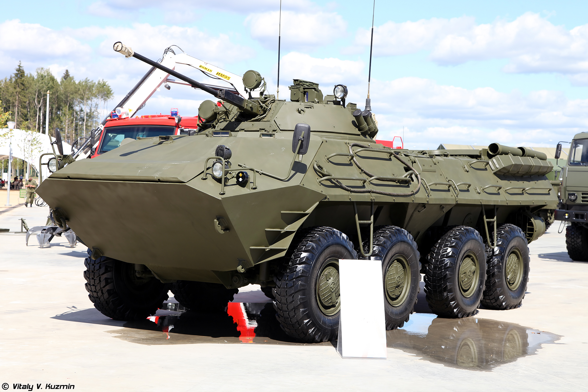 БТР-90 (BTR-90)